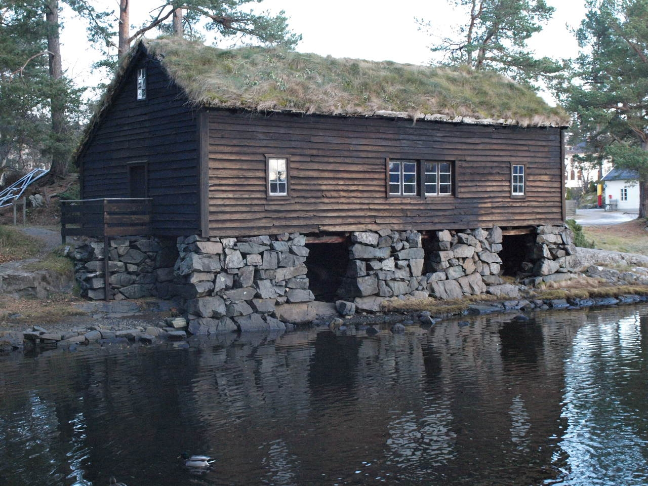 Fjordmannsstova på Sunnmøre museum